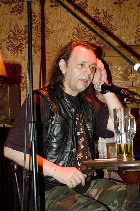 Bert Papenfuß-Gorek am 24. April 2007 im Kaffee Burger (Berlin-Mitte) bei der Benefiz-Lesung Krankenhaus später für Michael Stein